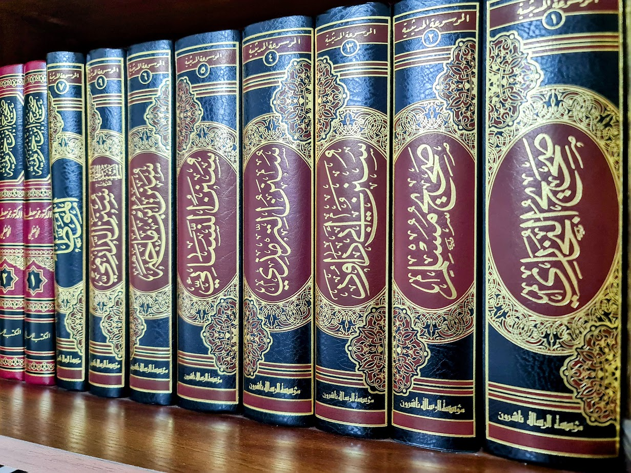 تصنيف:كتب أهل السنة والجماعة